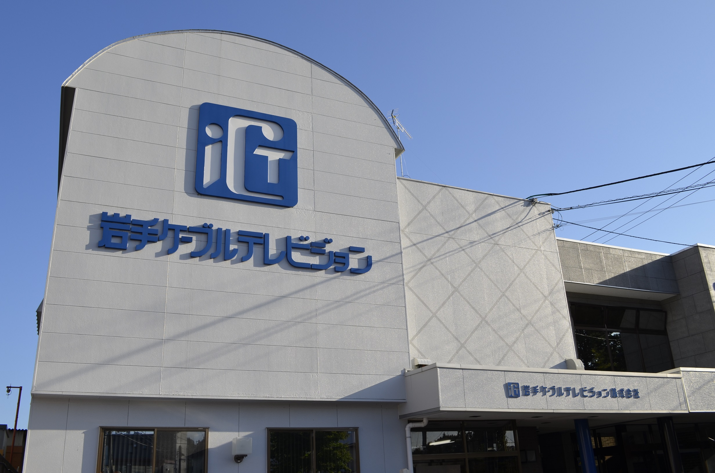 岩手ケーブルテレビジョン社屋写真